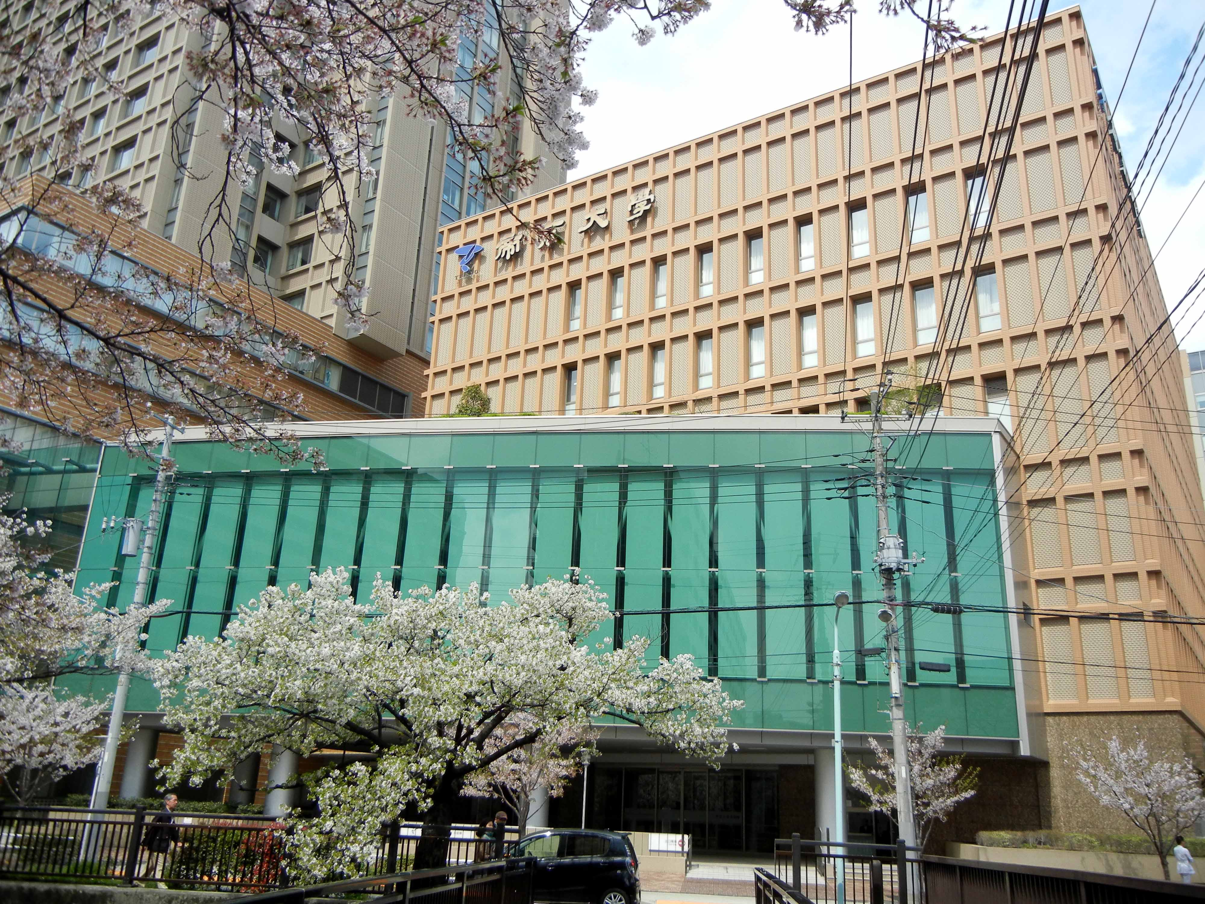 帝京大学板橋キャンパス 大学本部